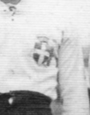 Escudo de la Selección de rugby de Italia en los años treinta